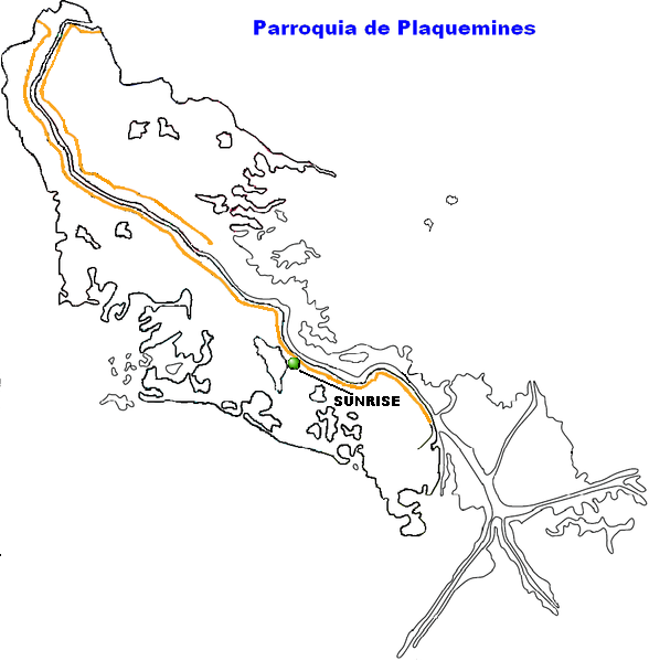 Sunrise, Louisiana.